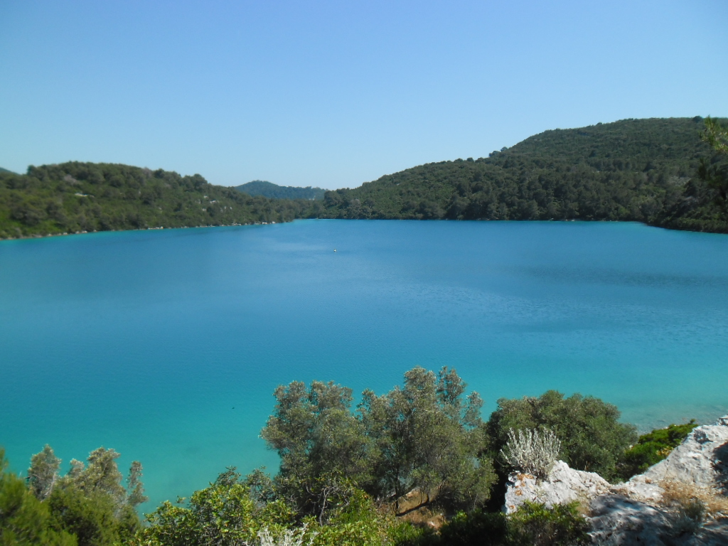 Malo jezero, Nacionalni park Mljet